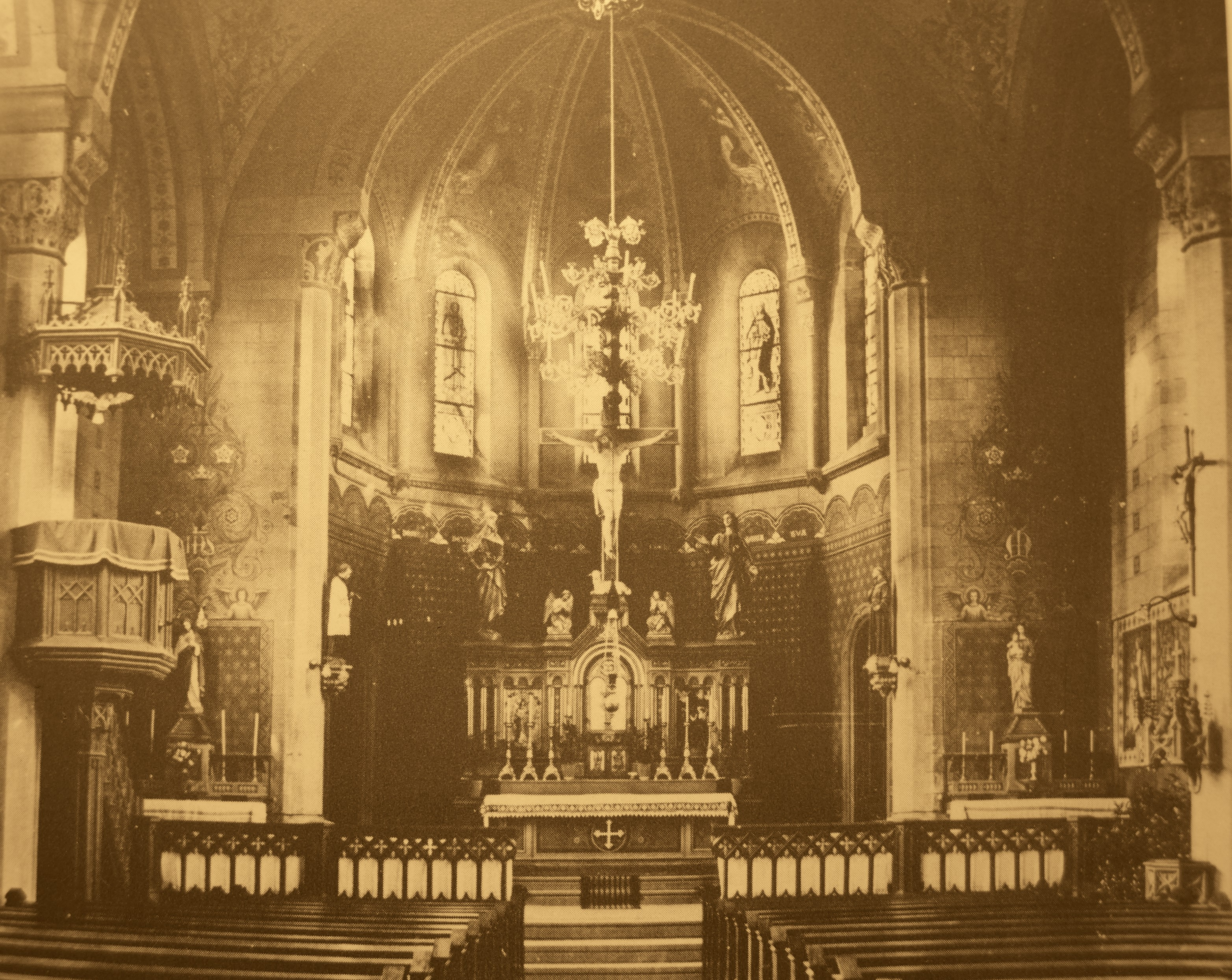 Wertheim, St. Venantius, Inneres um 1900 (Sammlung Hans Wehnert)